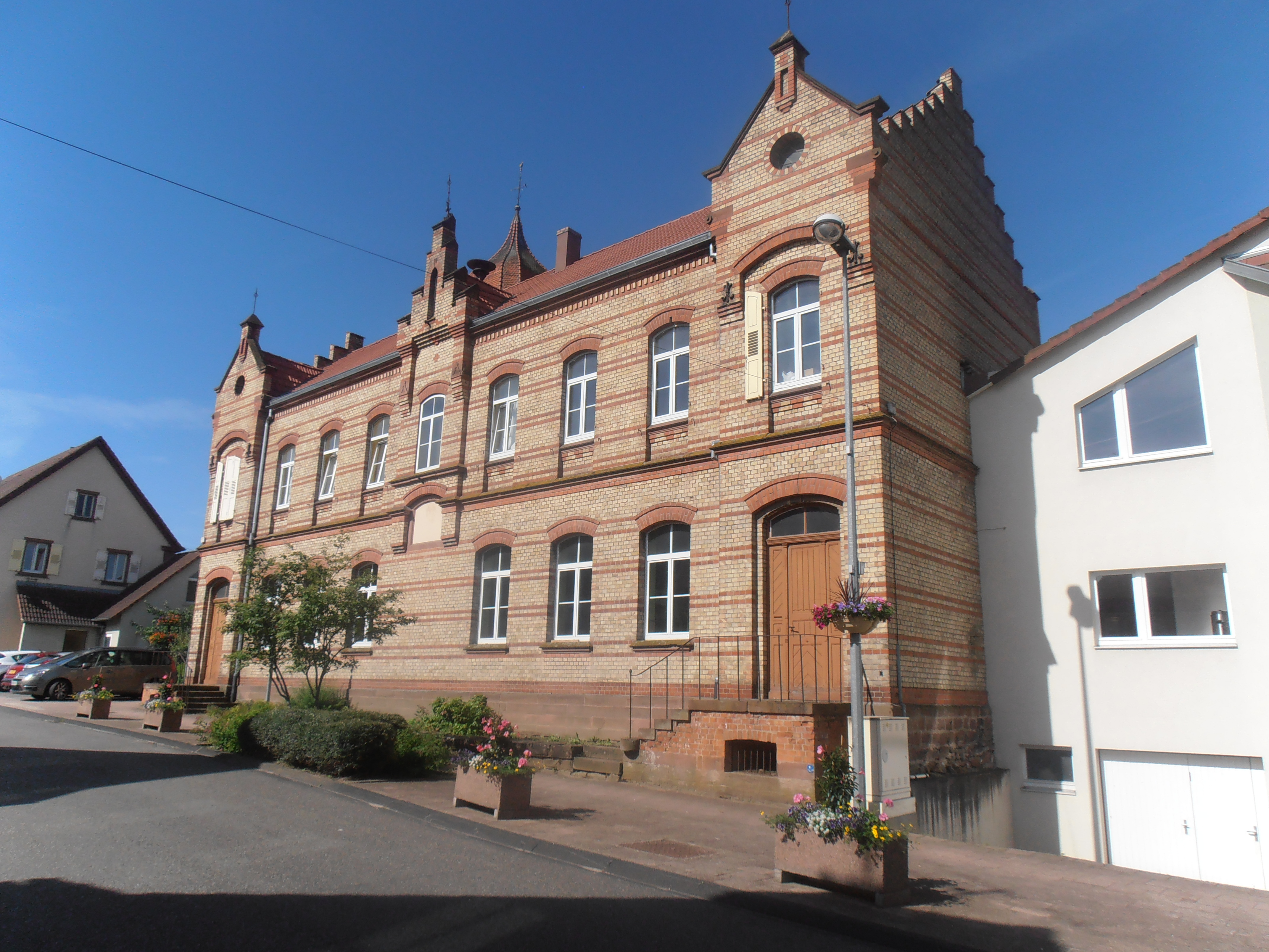 Ecole primaire de Durrenbach (Bas-Rhin)